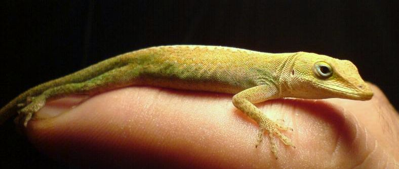 Anolis carolinensis